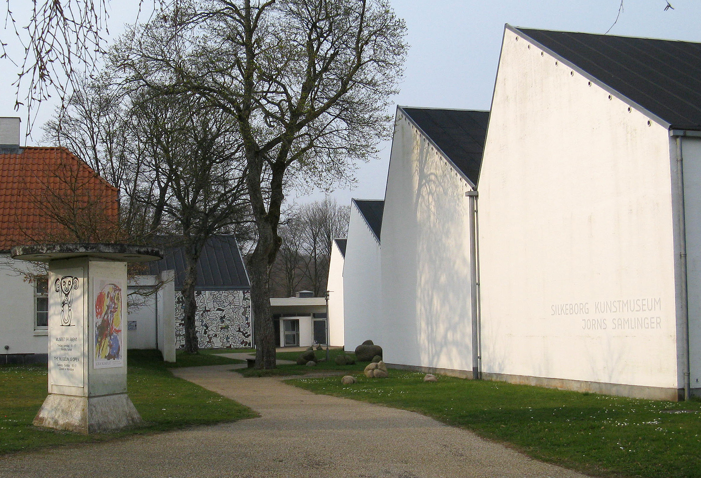 Silkeborg Kunstmuseum, indgangen